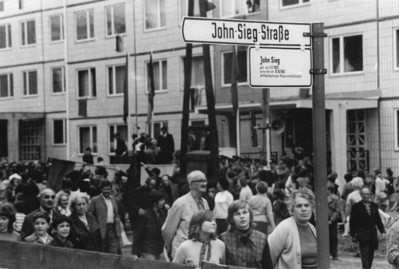 Berlin, Namensgebung John Sieg-Straße ADN-ZB Mittelstädt 22.6.72 Berlin: Straßenbenennung. John Sieg-Straße, nach dem antifaschistischen Widerstandskämpfer aus der Schulze- und Boysen-Harneck-Gruppe, heißt seit dem 22.6.72 eine der Straßen im Berliner Neubaugebiet Frankfurter Allee-Süd.